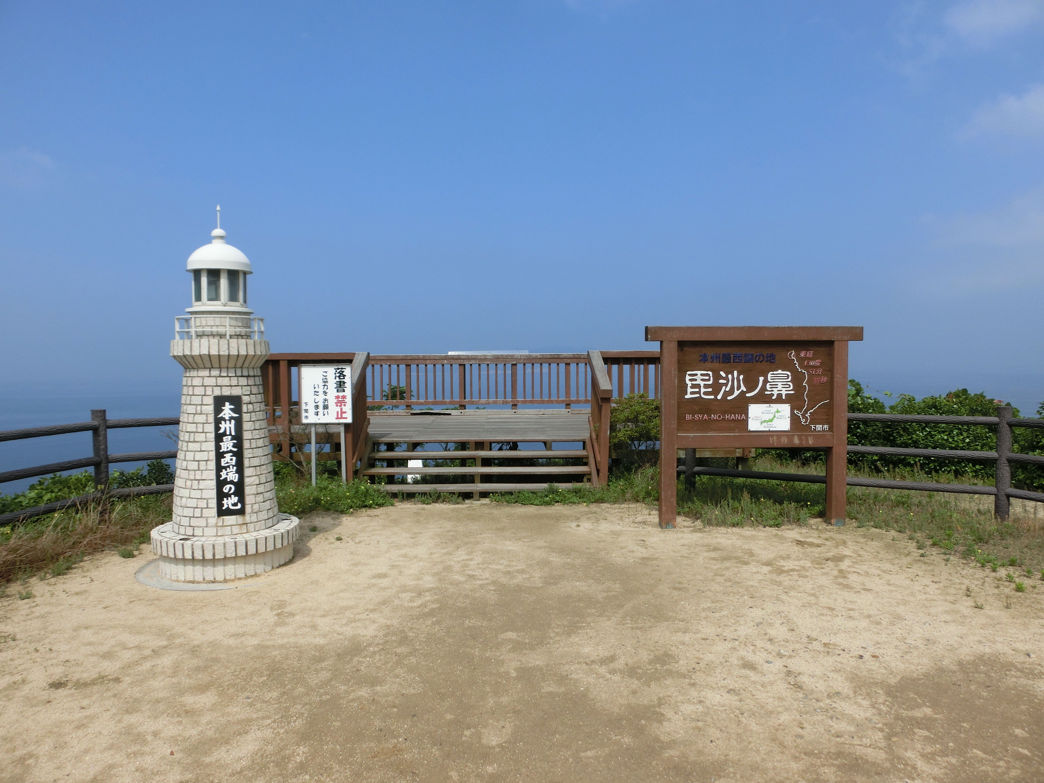 毘沙ノ鼻の展望広場